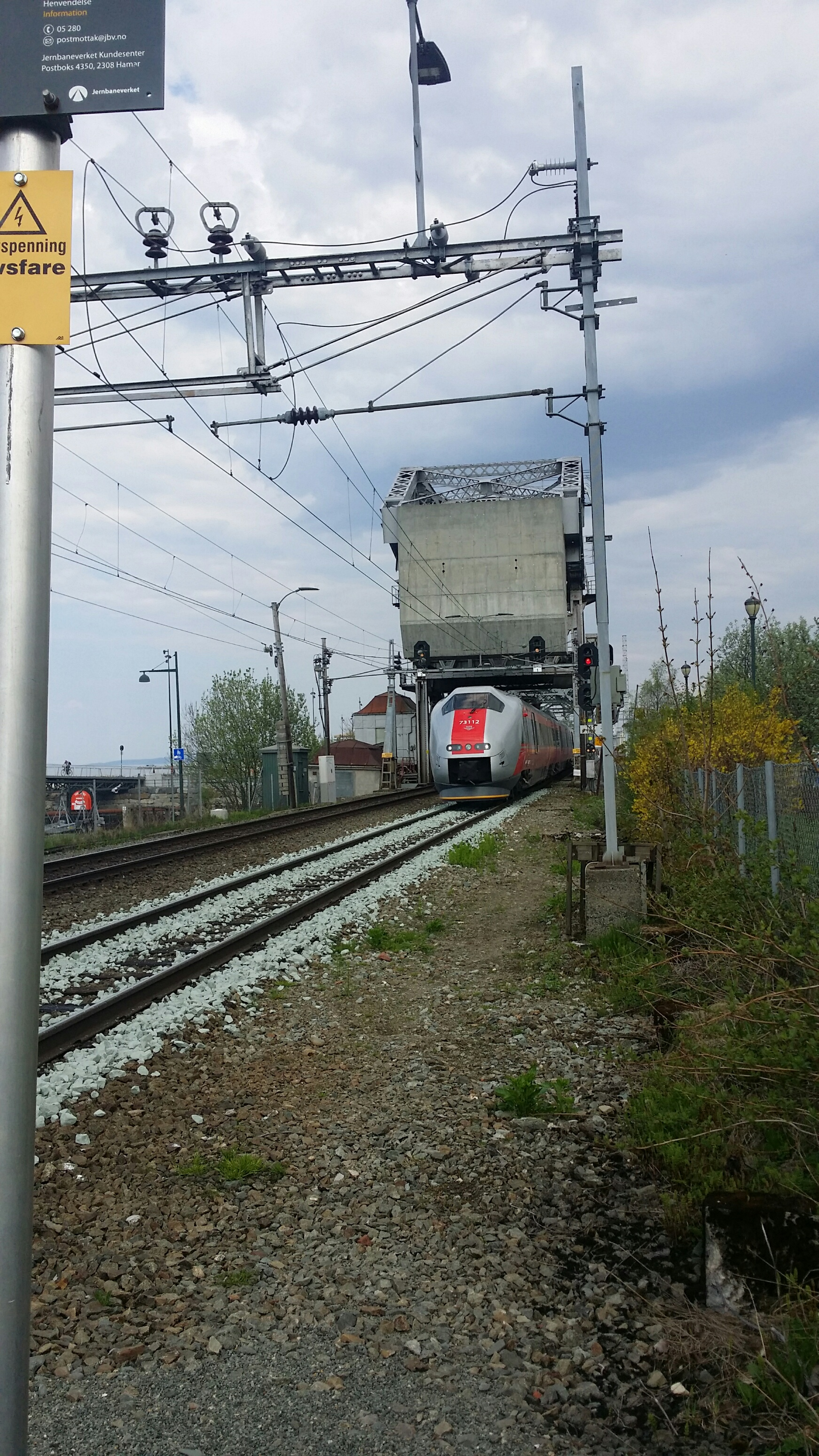 Skansen bru med tog til Oslo sett fra Skansen holdeplass.